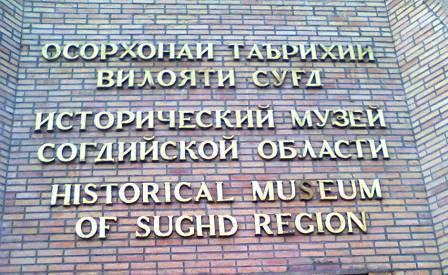 Доска Исторического музея Согдийской области (Таджикистан)Тоҷикӣ: Осорхонаи таърихии вилояти Суғд